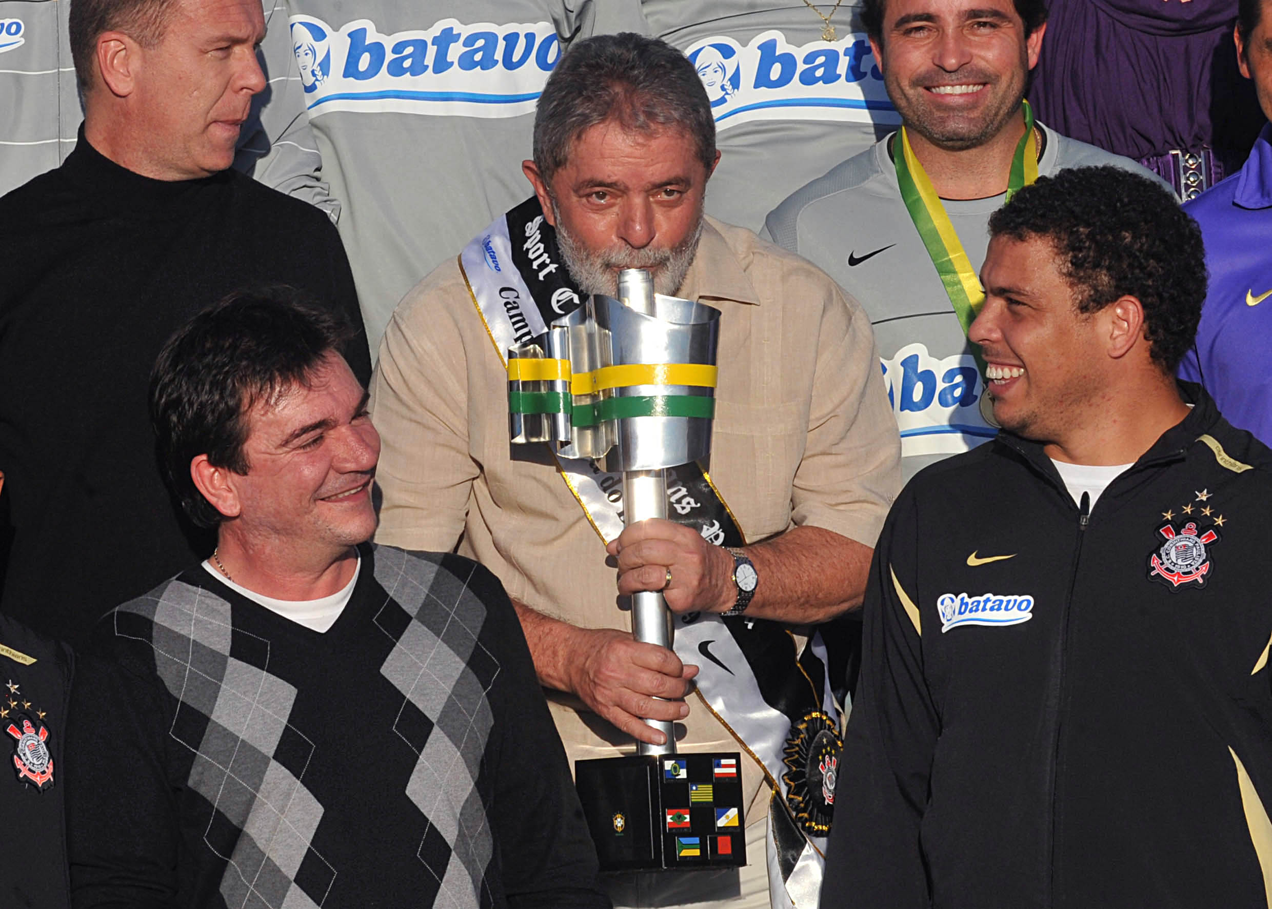 O ex-presidente Lula(FUMANDO A TAÇA) recebe os jogadores do Corinthians, a delegação foi recebida após conquistar o título da Copa do Brasil, na quarta-feira, em Porto Alegre, com empate por 2 a 2 diante do Internacional